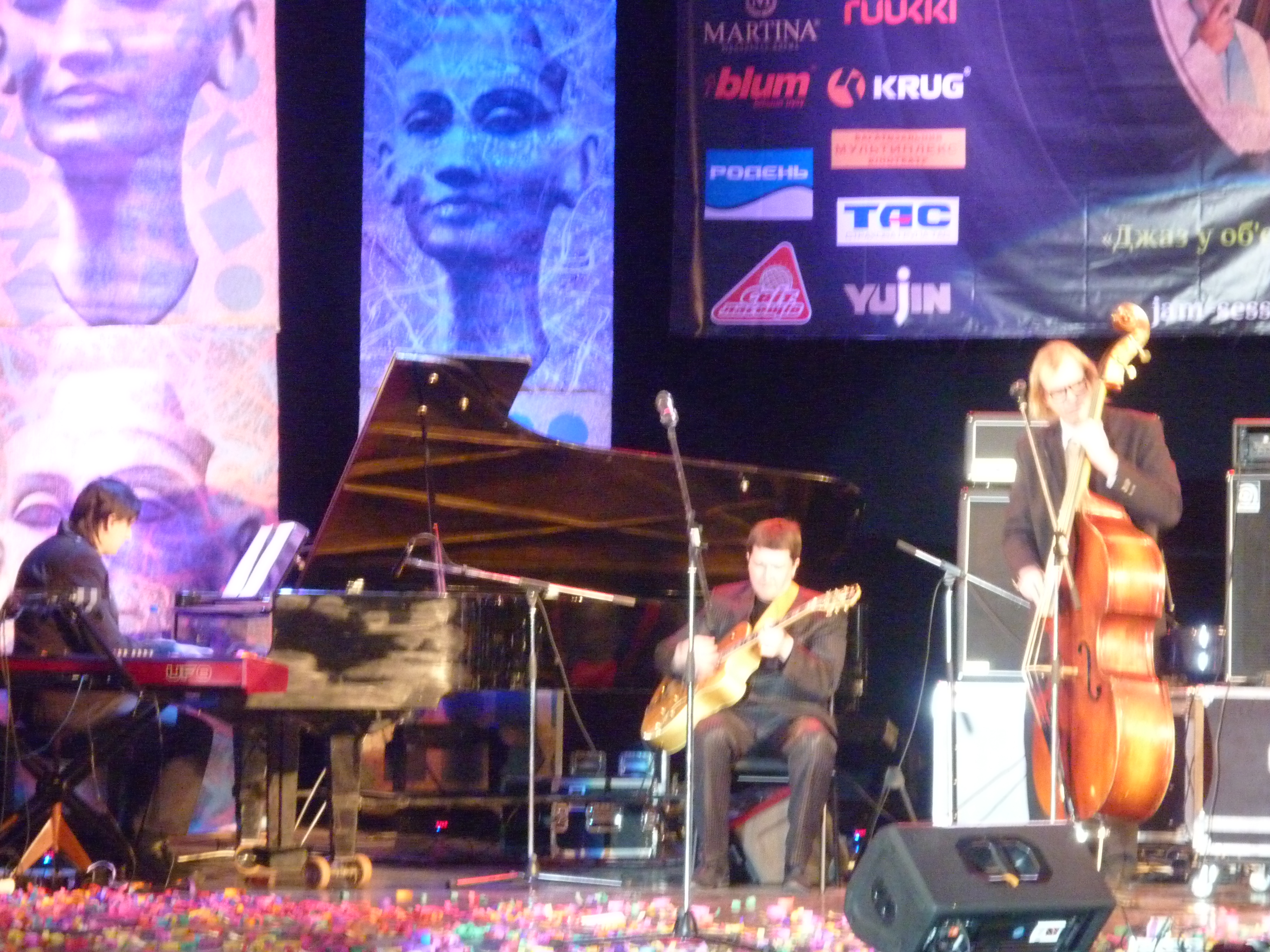 Тріо Андрія Арнаутов (Ендрі Валентайна) на фестивалі "Черкаські джазові дні-2012"